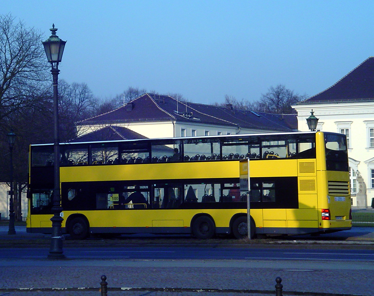 Doppeldeckerbus, dreiachsig der Berliner Verkehrsbetriebe (aktuelles Modell Typ MAN A 39 seit 2005) vor dem Schloß Bellevue, Berlin